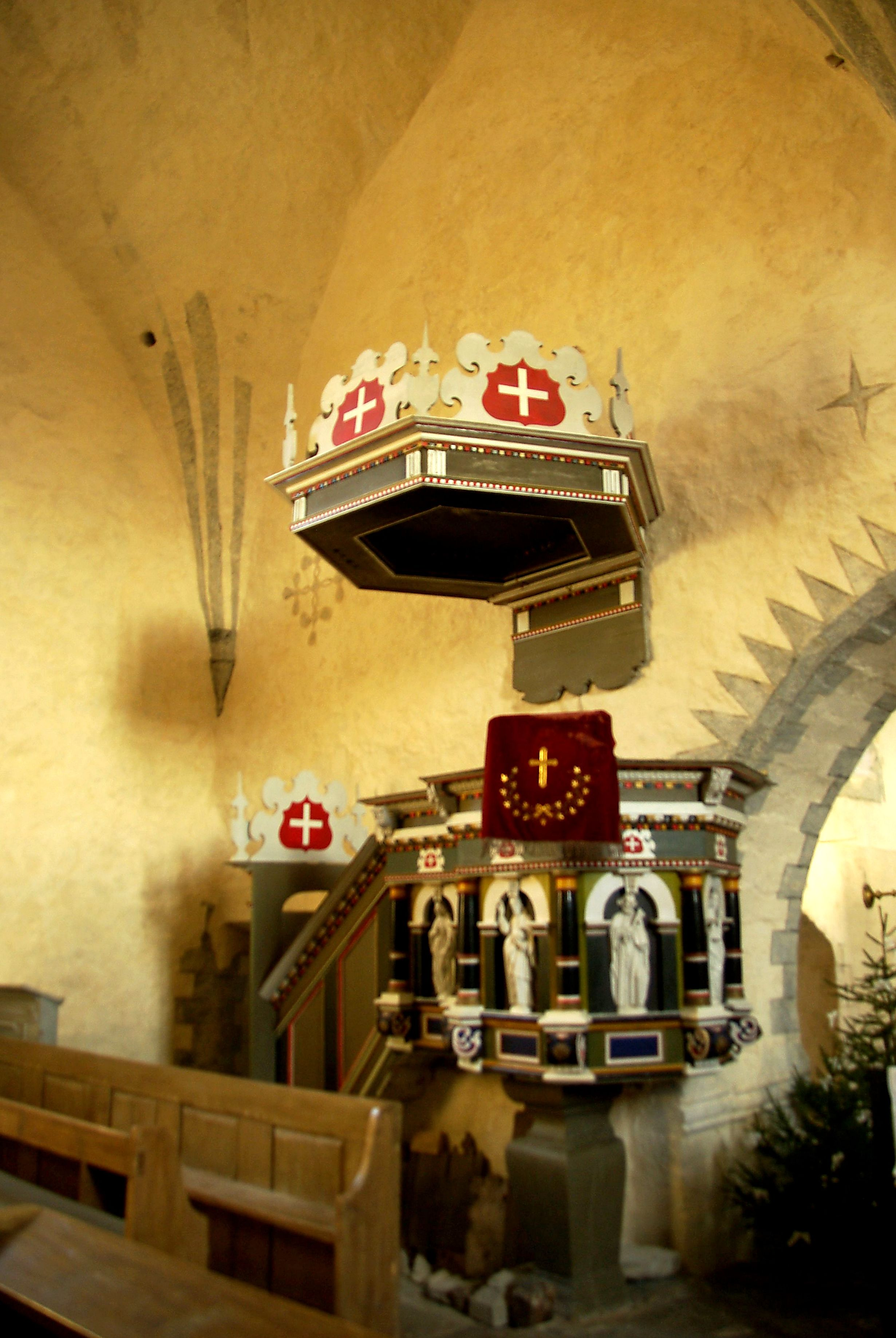 Kantsel, Tobias Heintze, 1630 (puit, polükroomia)